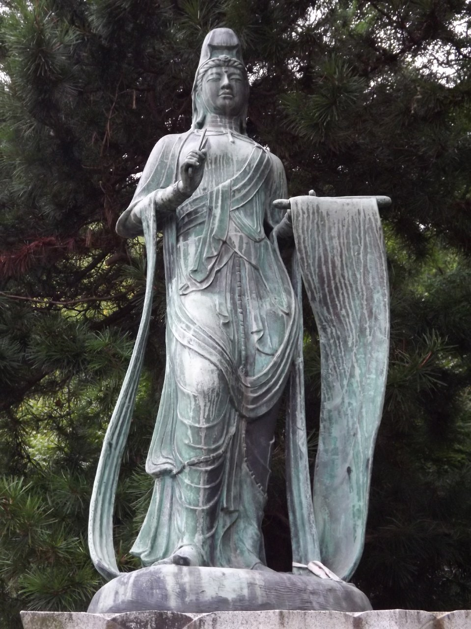 切幡寺の観音様